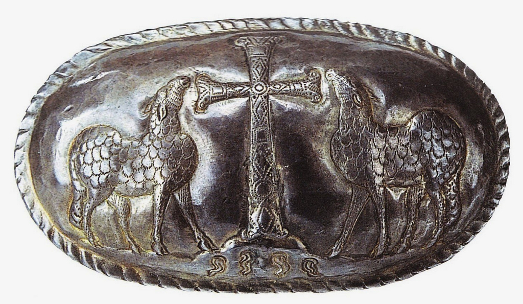 Capsella reliquiario, IV-V d.C. Materiali argento Collocazione Tesoro del Duomo, Grado